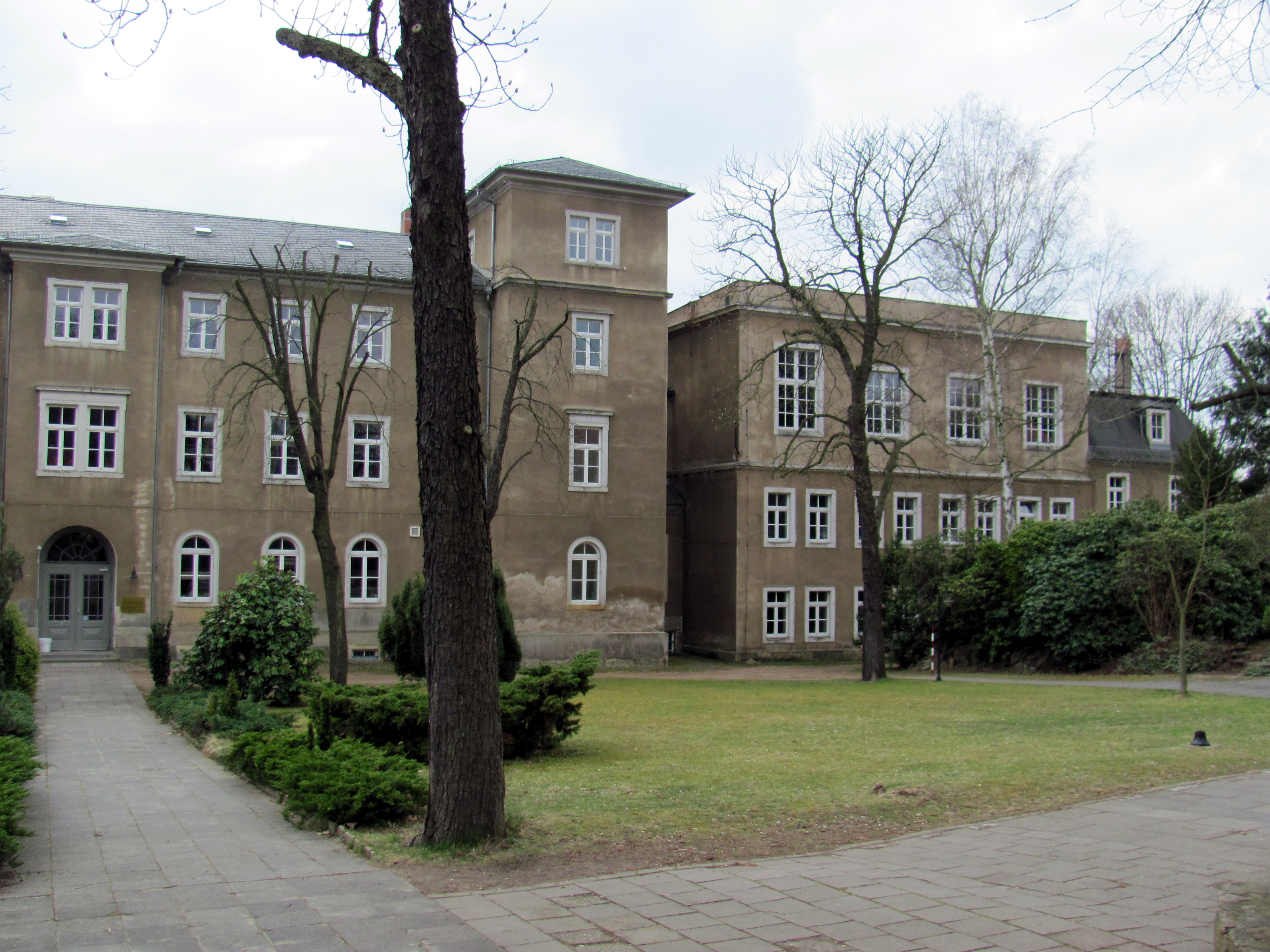 Radebeul-Niederlößnitz, Gymnasium Luisenstift Nebenbau